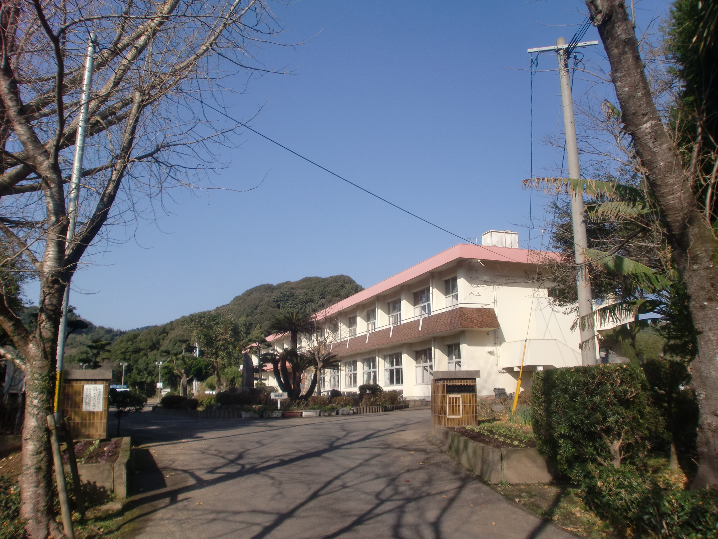 日置市立美山小学校の外観。